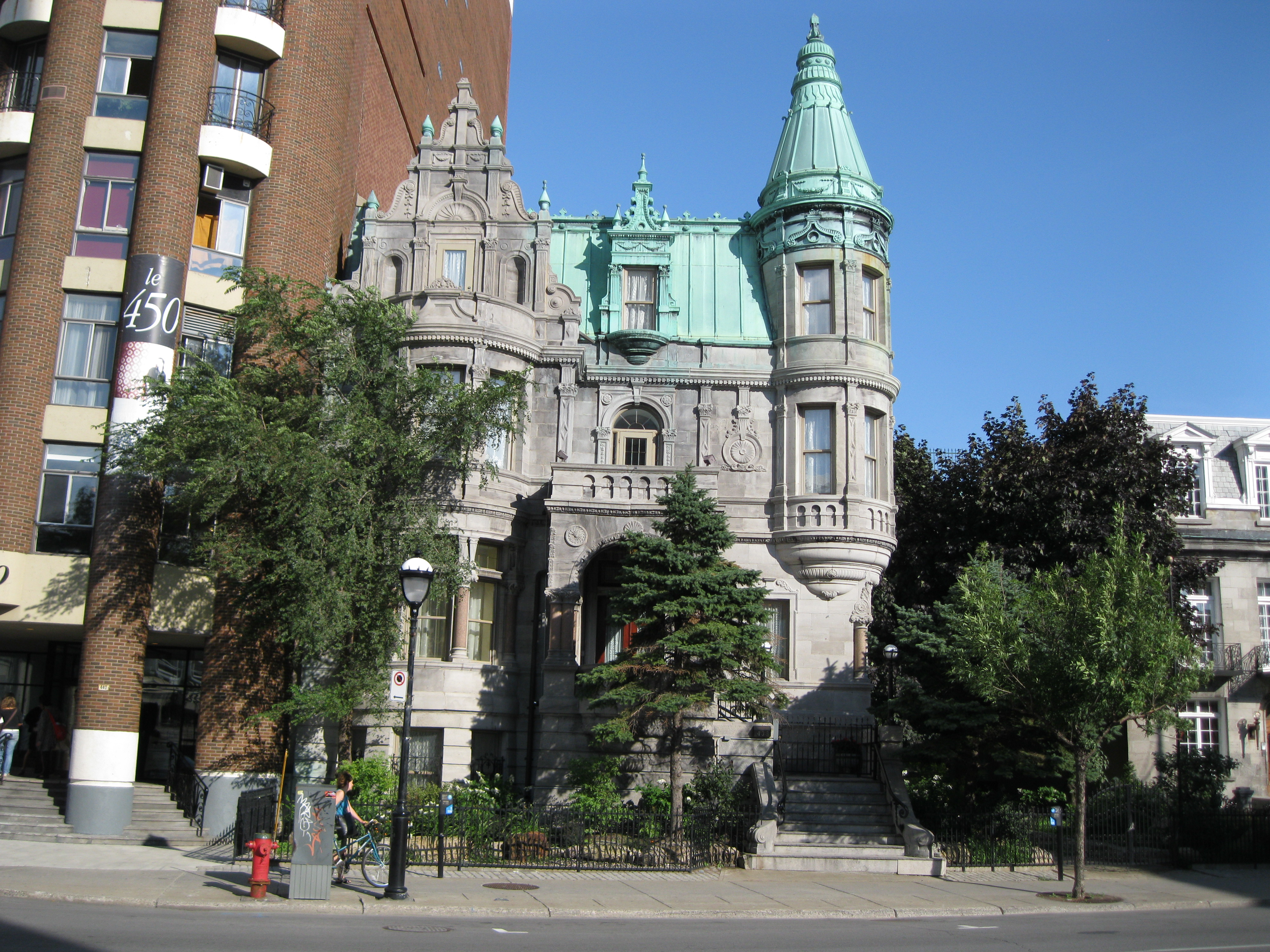 La maison Arthur-Dubuc, citée monument historique, est une résidence bourgeoise construite en 1894. Elle est située au 434, rue Sherbrooke Est, Montréal. À gauche: Le 450 Sherbrooke Est